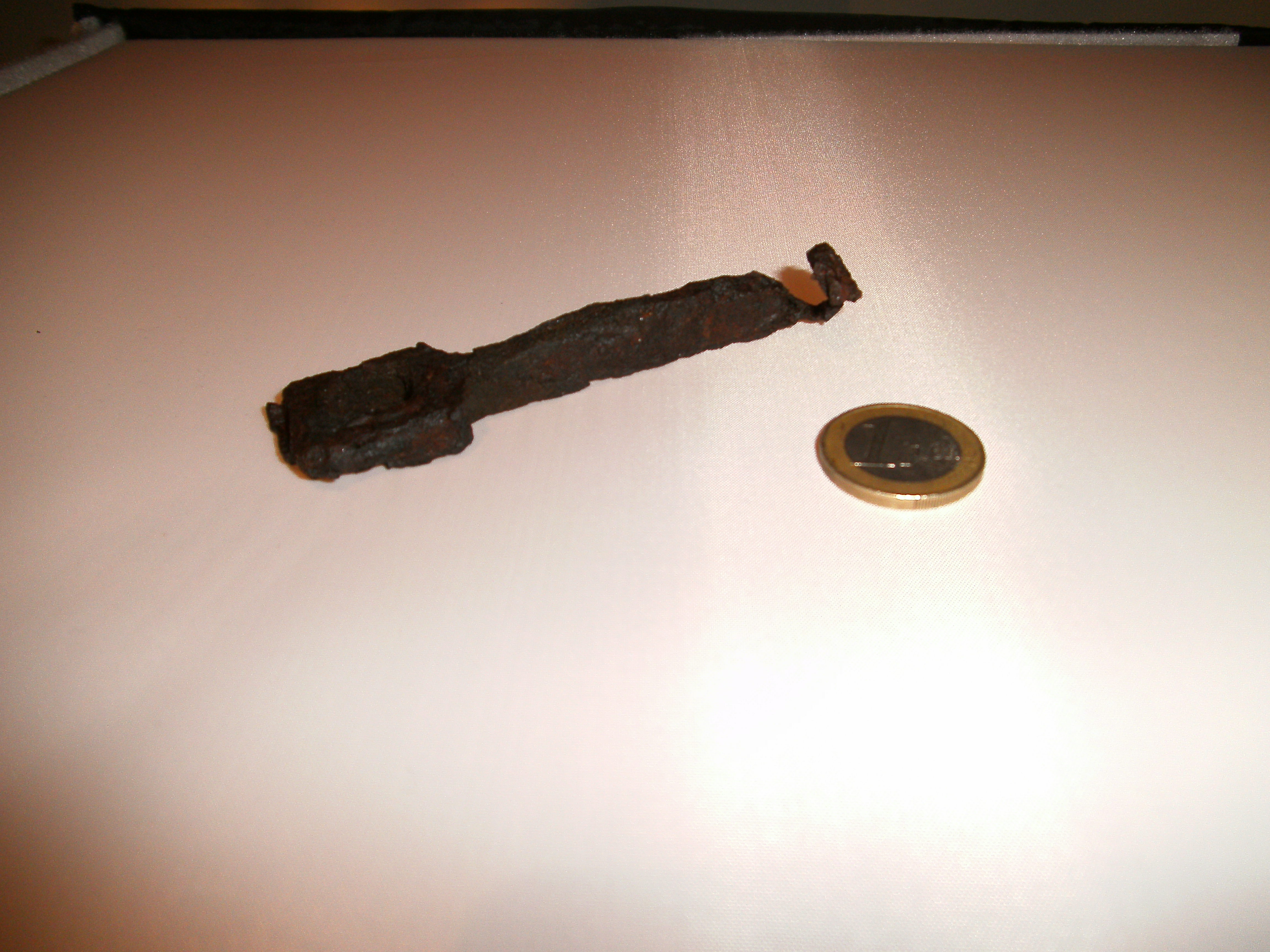 Romeinse sleutel gevonden te Elewijt